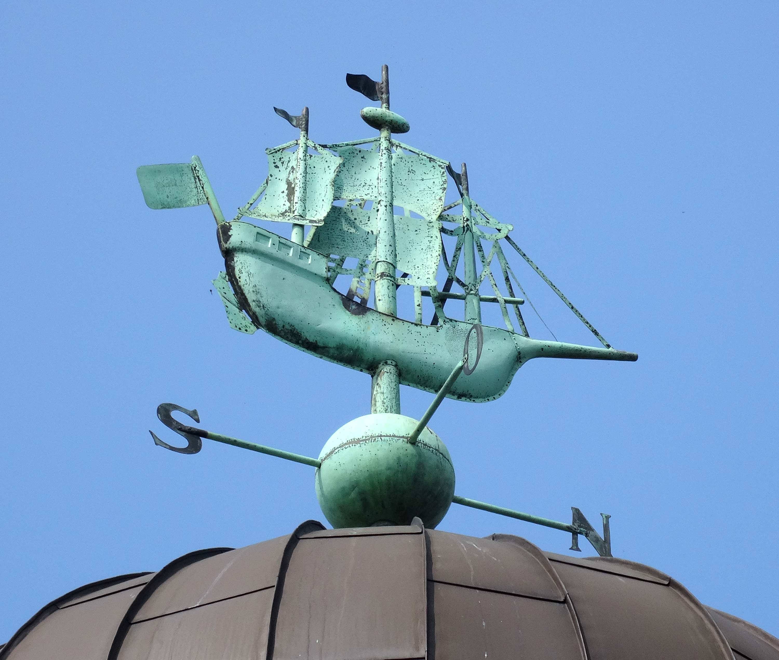 Lloyd-Bahnhof, Gepäckabteilung und Auswandererbahnhof des Norddeutschen Lloyd in Bremen, Gustav-Deetjen-Allee 2. WetterfahneDas abgebildete Objekt ist ein geschütztes Kulturdenkmal in der Freien Hansestadt Bremen, mit der Nr. 1243 beim Landesamt für Denkmalpflege registriert.